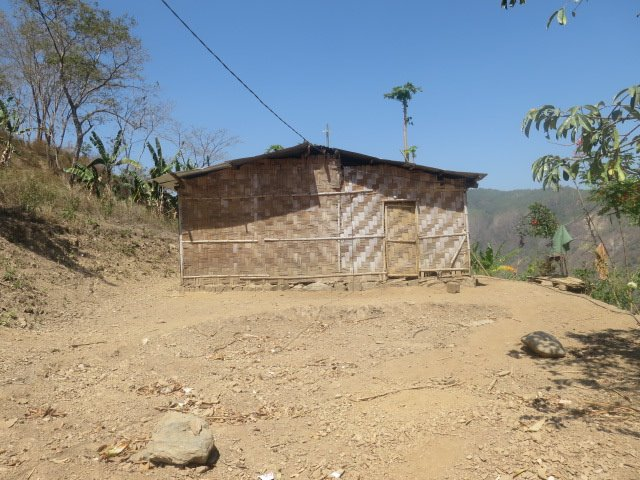 Tetun: Suku Fatisi